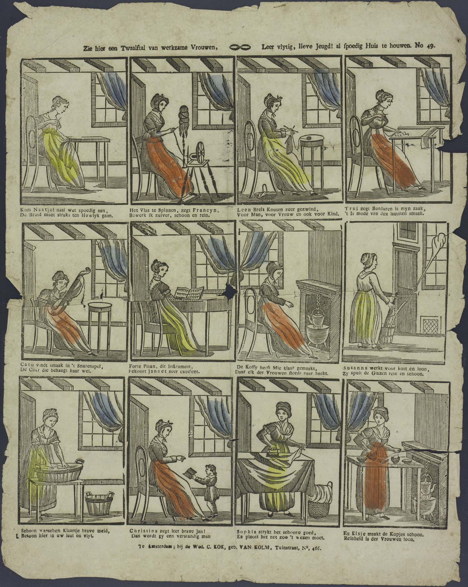 Centsprent met 3 x 4 houtsneden, met voorstellingen van vrouwelijke bezigheden: naaien, spinnen, breien, borduren, citer spelen, forte piano spelen, koffie zetten, glazen wassen, kleding wassen, onderwijzen, strijken, afwassen. Met tweeregelige rijmende onderschriften.